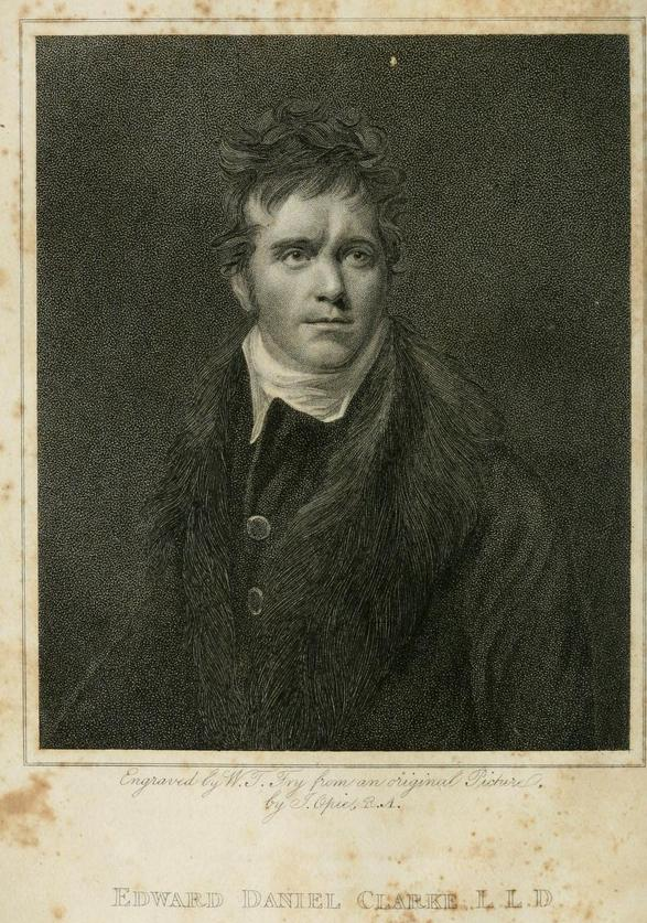 Edward Daniel Clarke 1816, Frontispiz in Band I seiner "Travel in Various Countries of Europe, Asia and Africa", 4. Ausgabe, London 1816